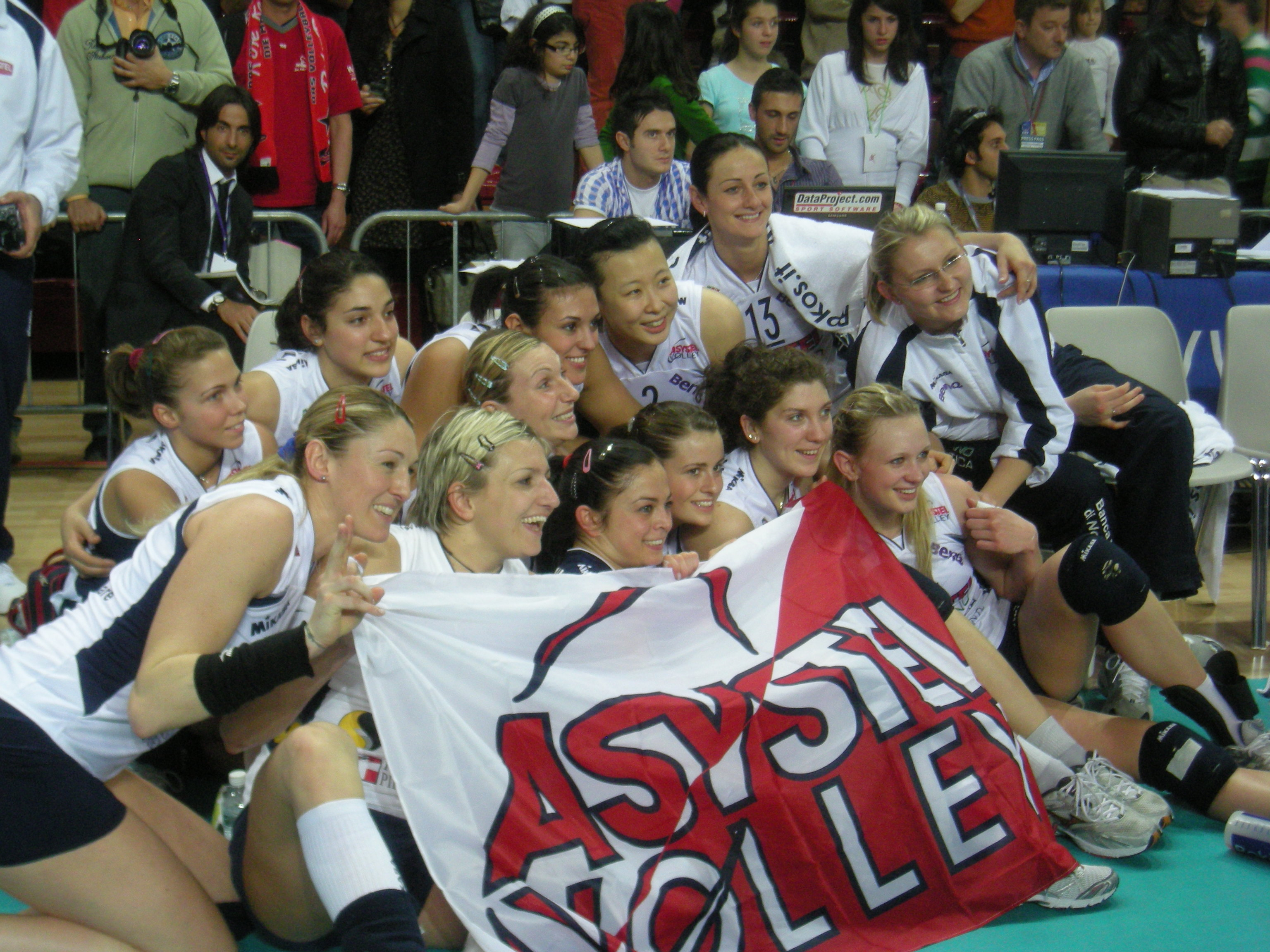 Festeggiamenti dell'Asystel Novara dopo la vittoria della Coppa CEV